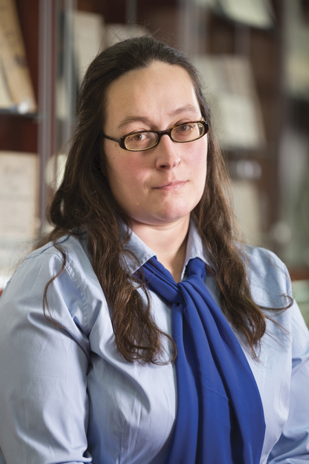 Драгана Ћорић